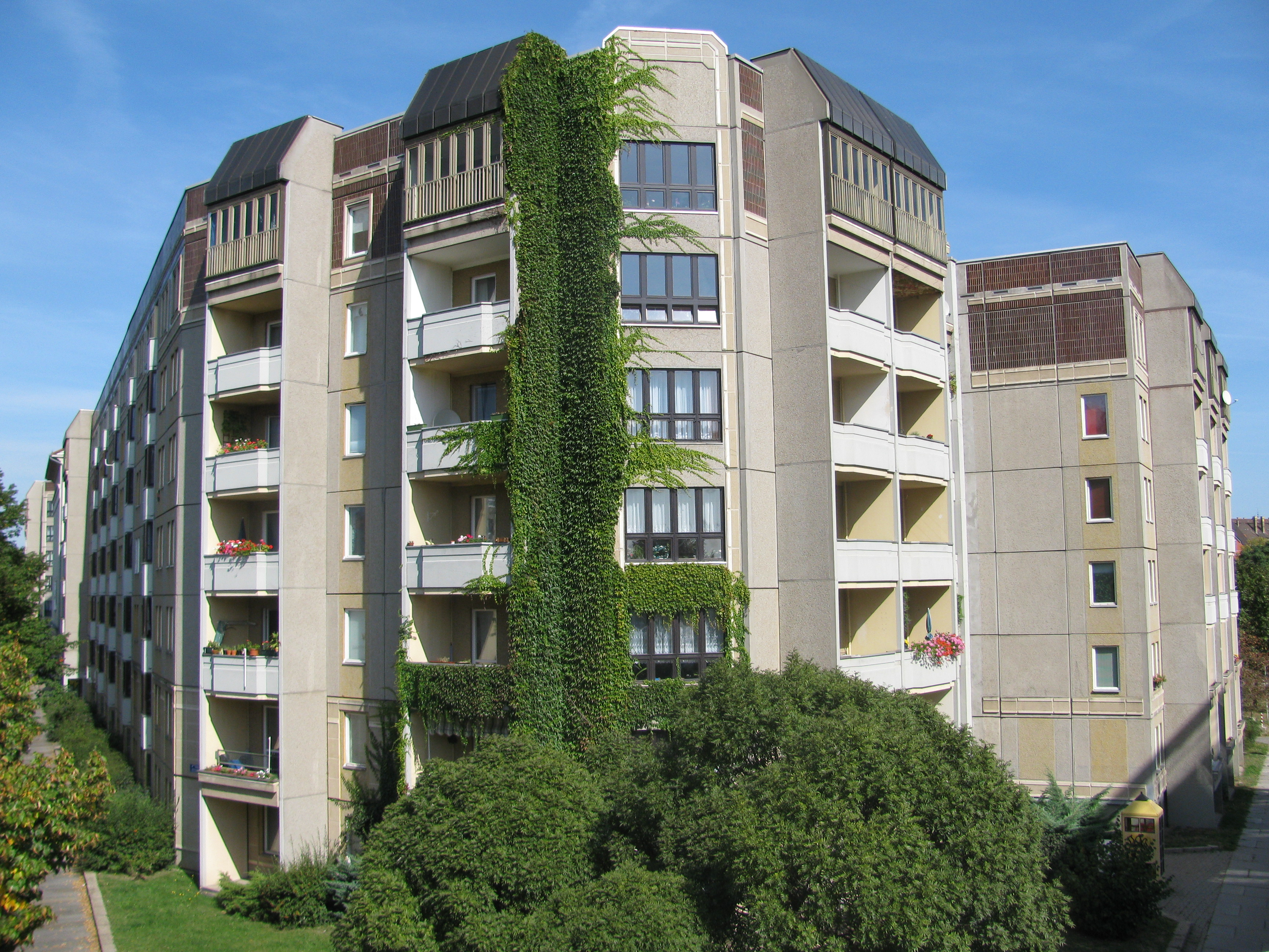 Albertstraße, Dresden, Stadtteil Innere Neustadt. Sechsgeschossige Wohnbebauung im nördlichen Teil der Straße (östliche Straßenseite).